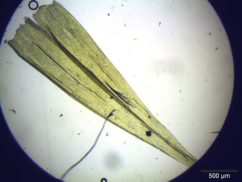 Gelbliches Seidenmoos (Homalothecium lutescens), Blatt, Vergrößerung: 40x